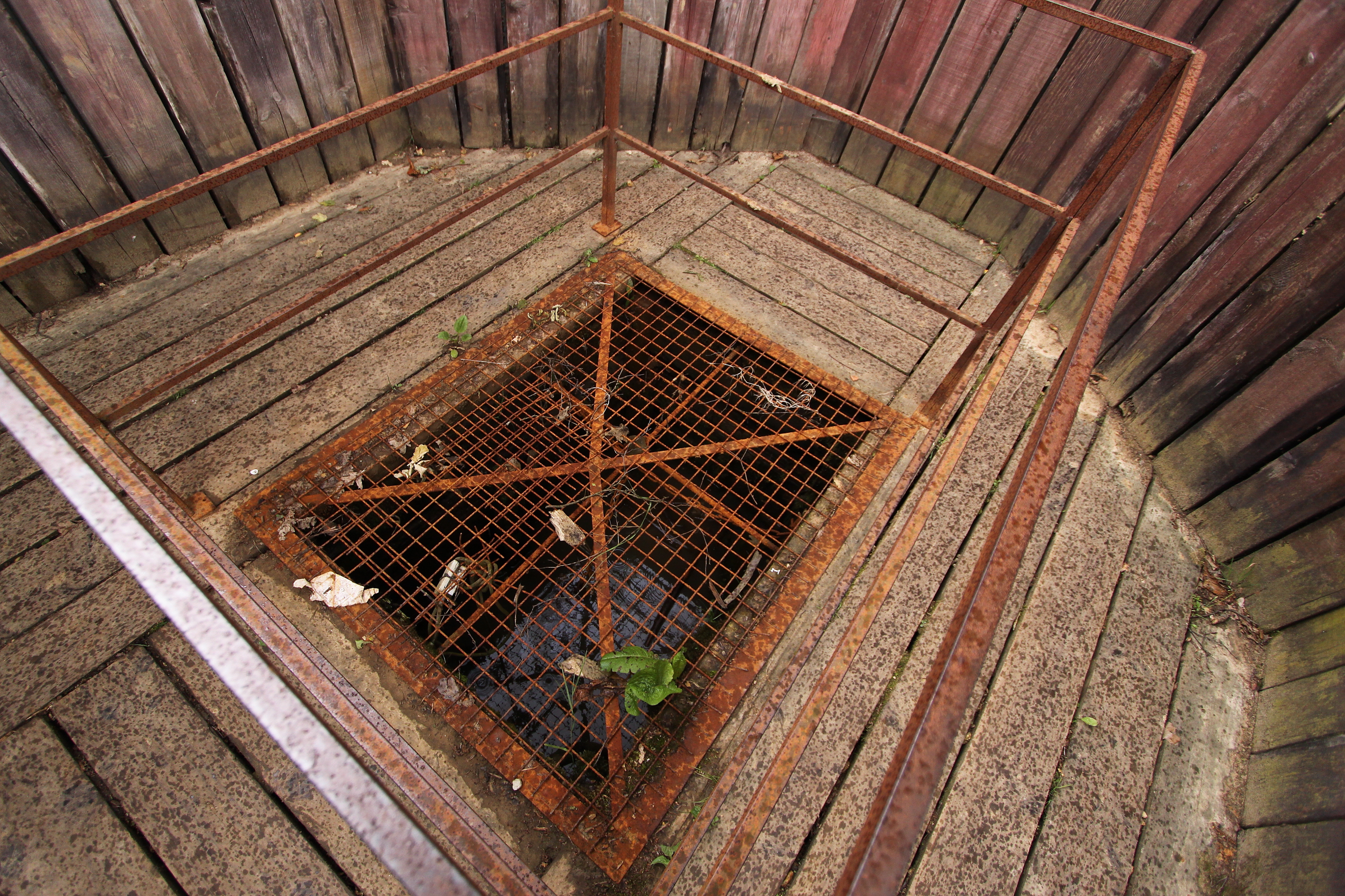 Bayernwald